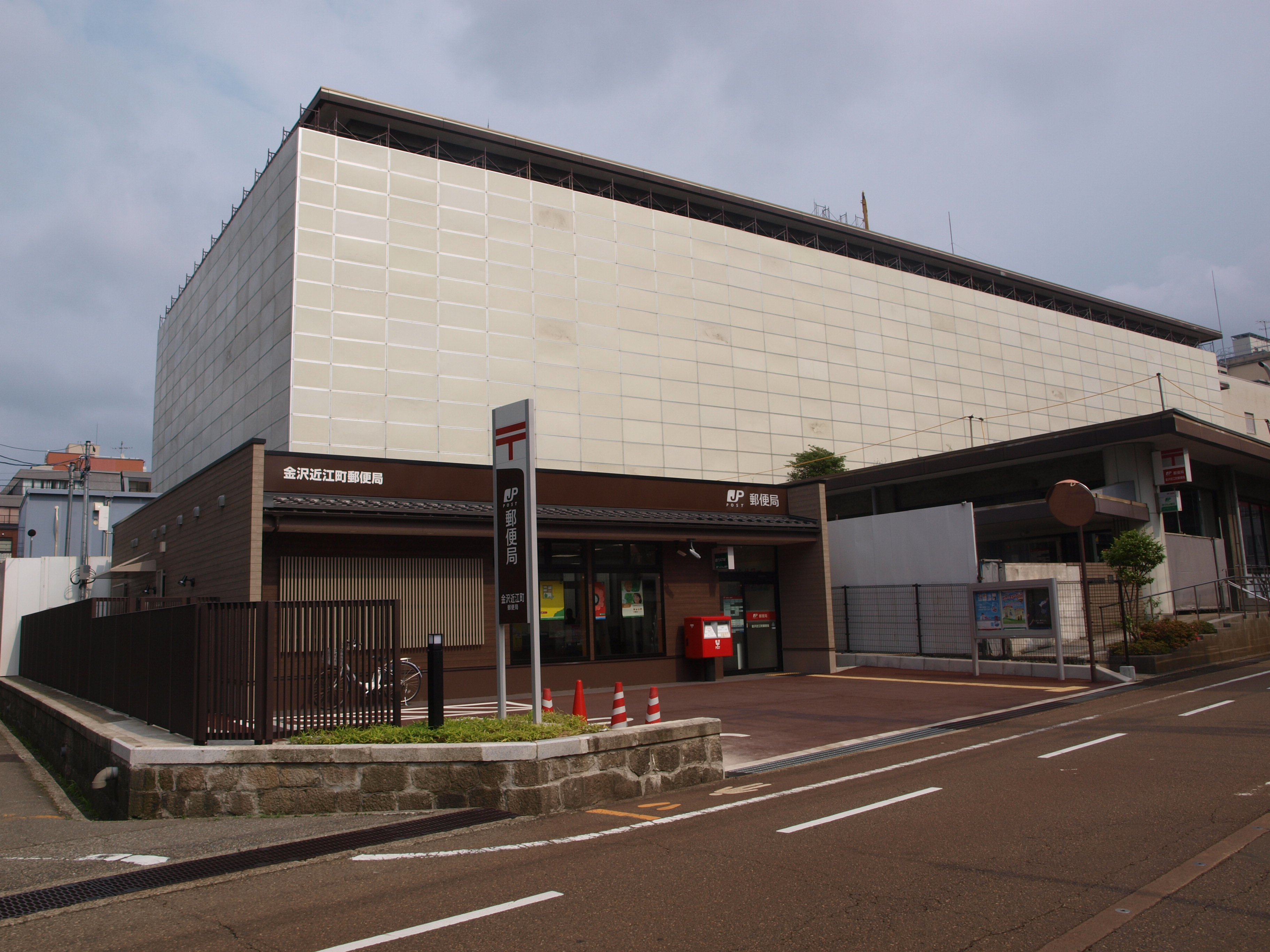 背後は、移転前に郵便局が収容されていた日本郵便北陸ビル